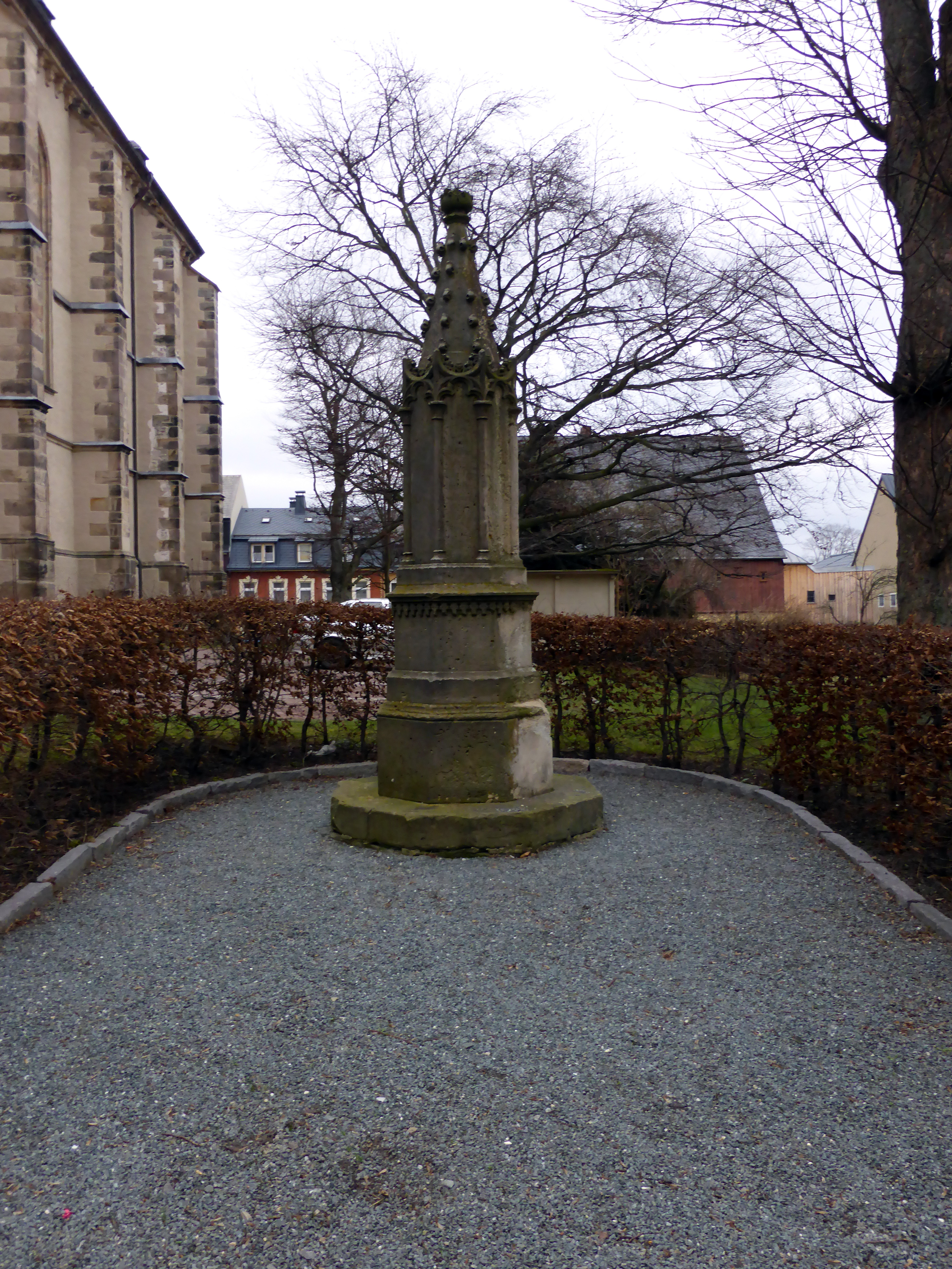 Johann Ehrenfried Wagner-Säule Marienberg, Erzgebirgskreis - Sachsen.